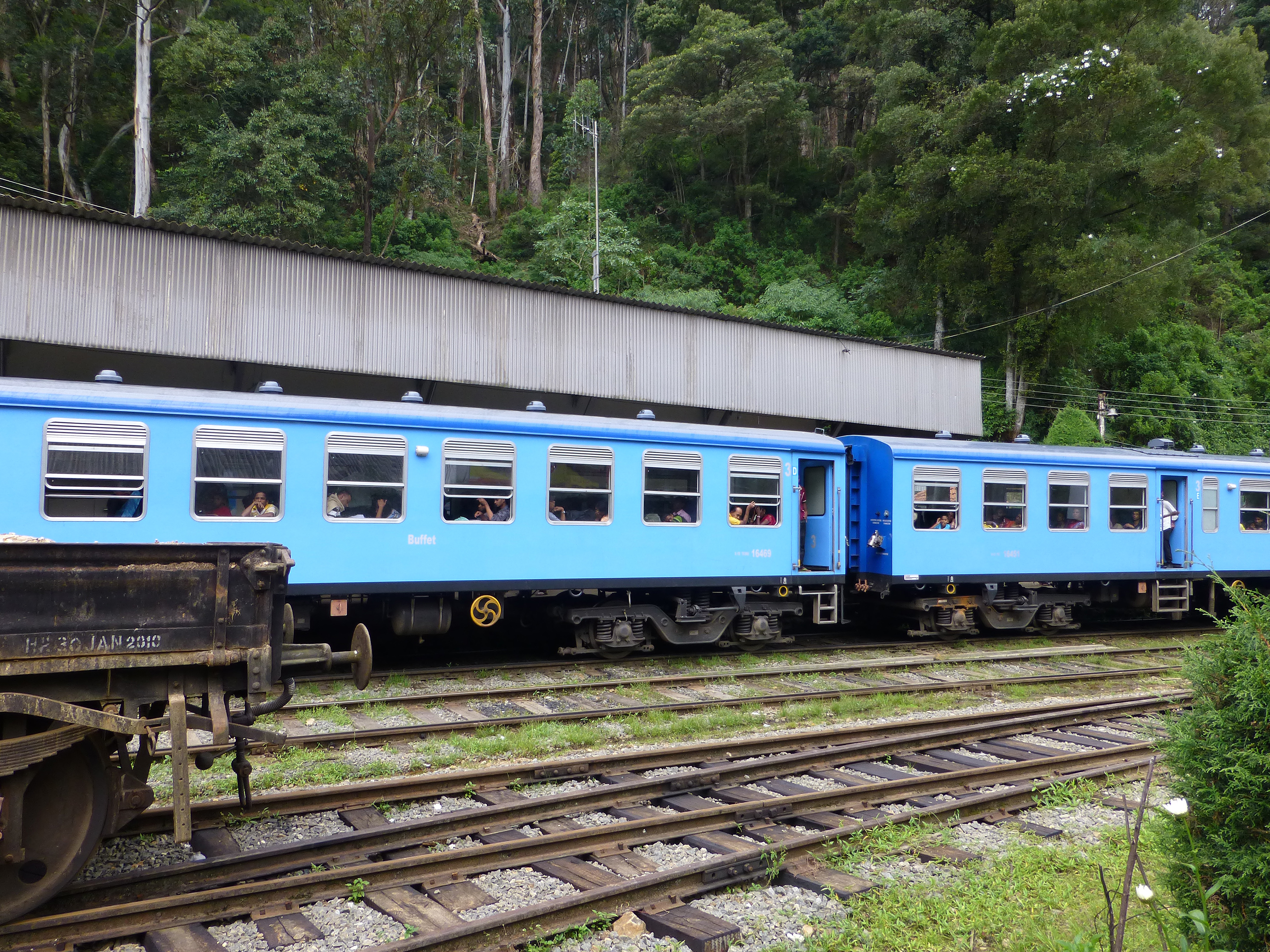 Sri Lanka, Province d'Uva : gare d'Ohiya